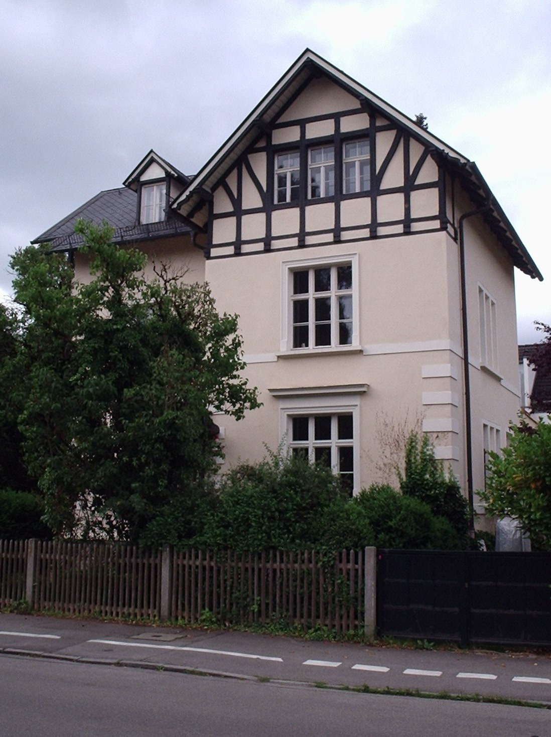 Denkmalgeschützte Villa ("Buchauer-Villa") in der Hofbrunnstraße 27 in München-Solln